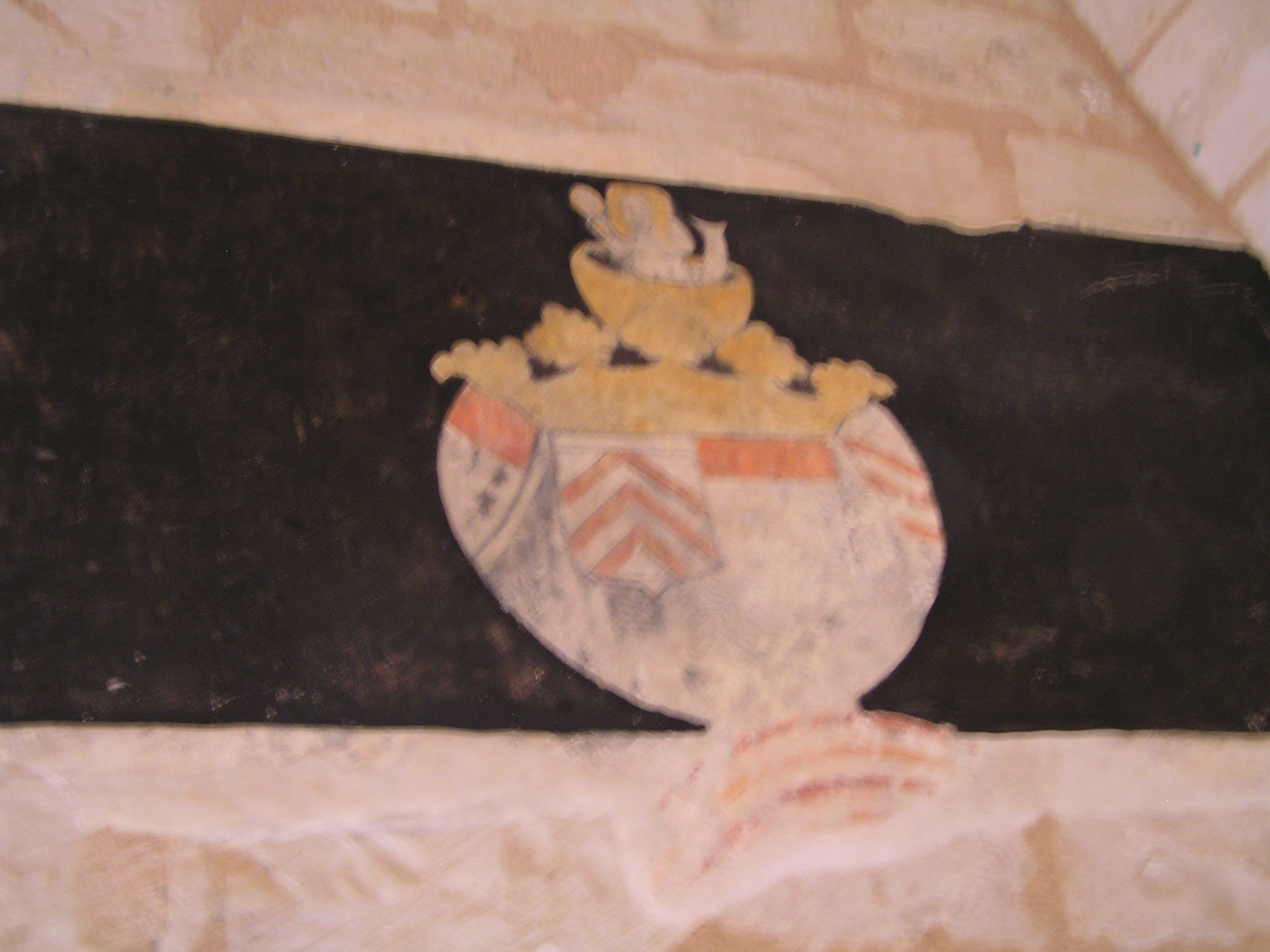 Trauerband in der Kirche von Bignac, Charente, Frankreich